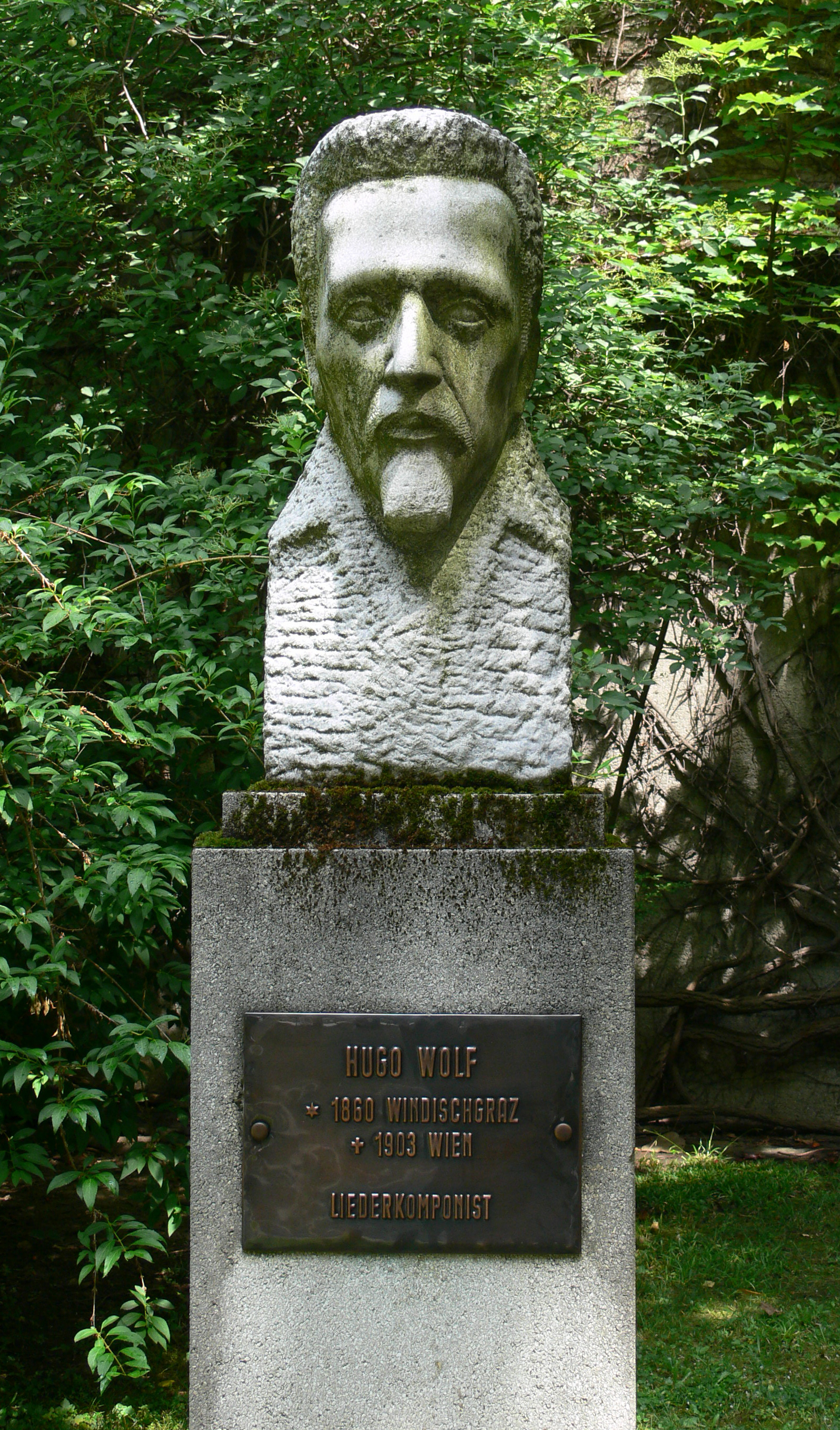 Ehrengalerie in einem Hof der Grazer Burg Büste „Hugo Wolf“ von Erwin Huber, 1959